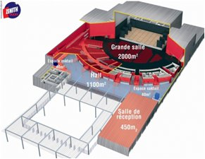 Plan 3D du Zénith de Dijon